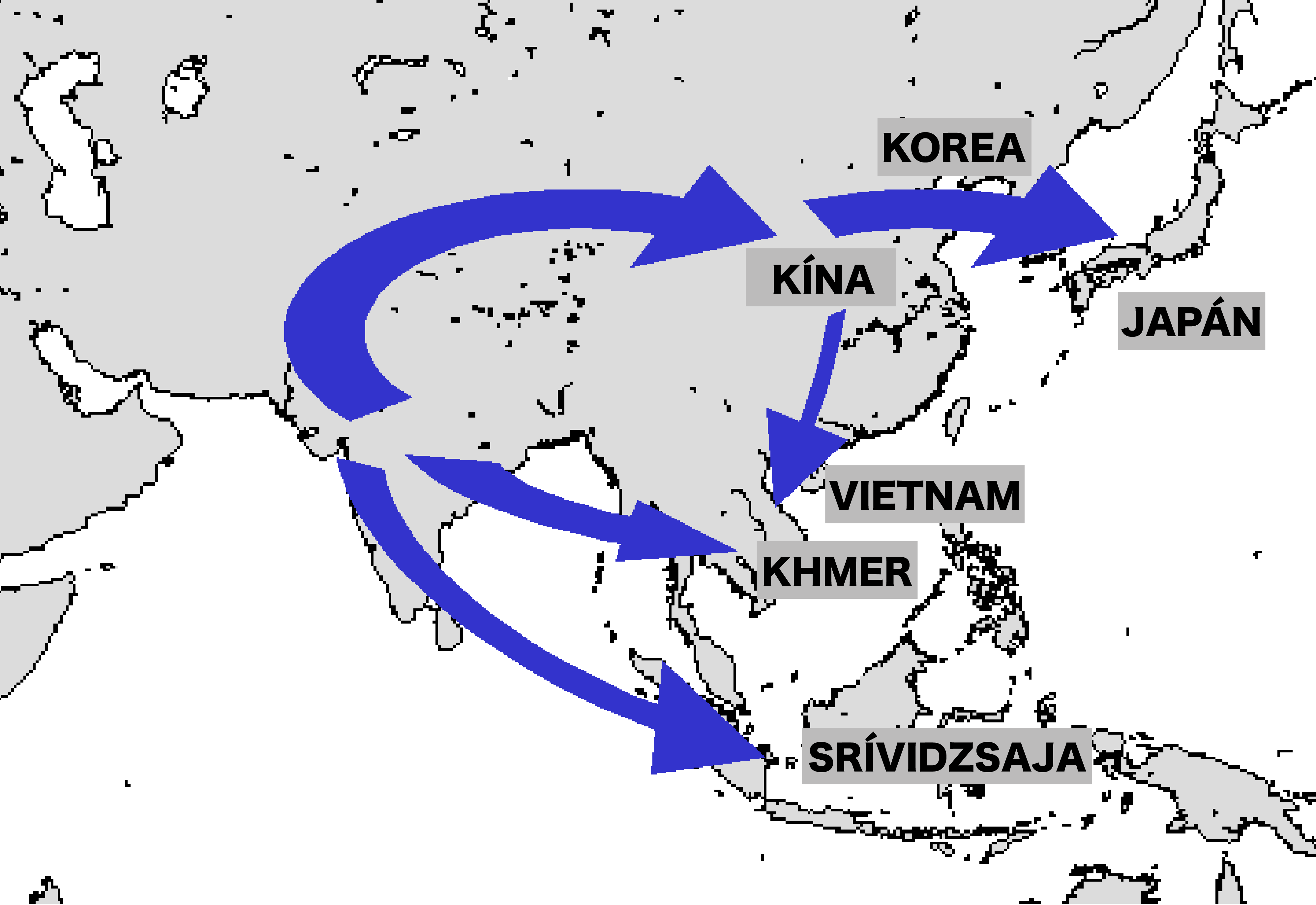 A mahájána buddhizmus terjedése Ázsiában